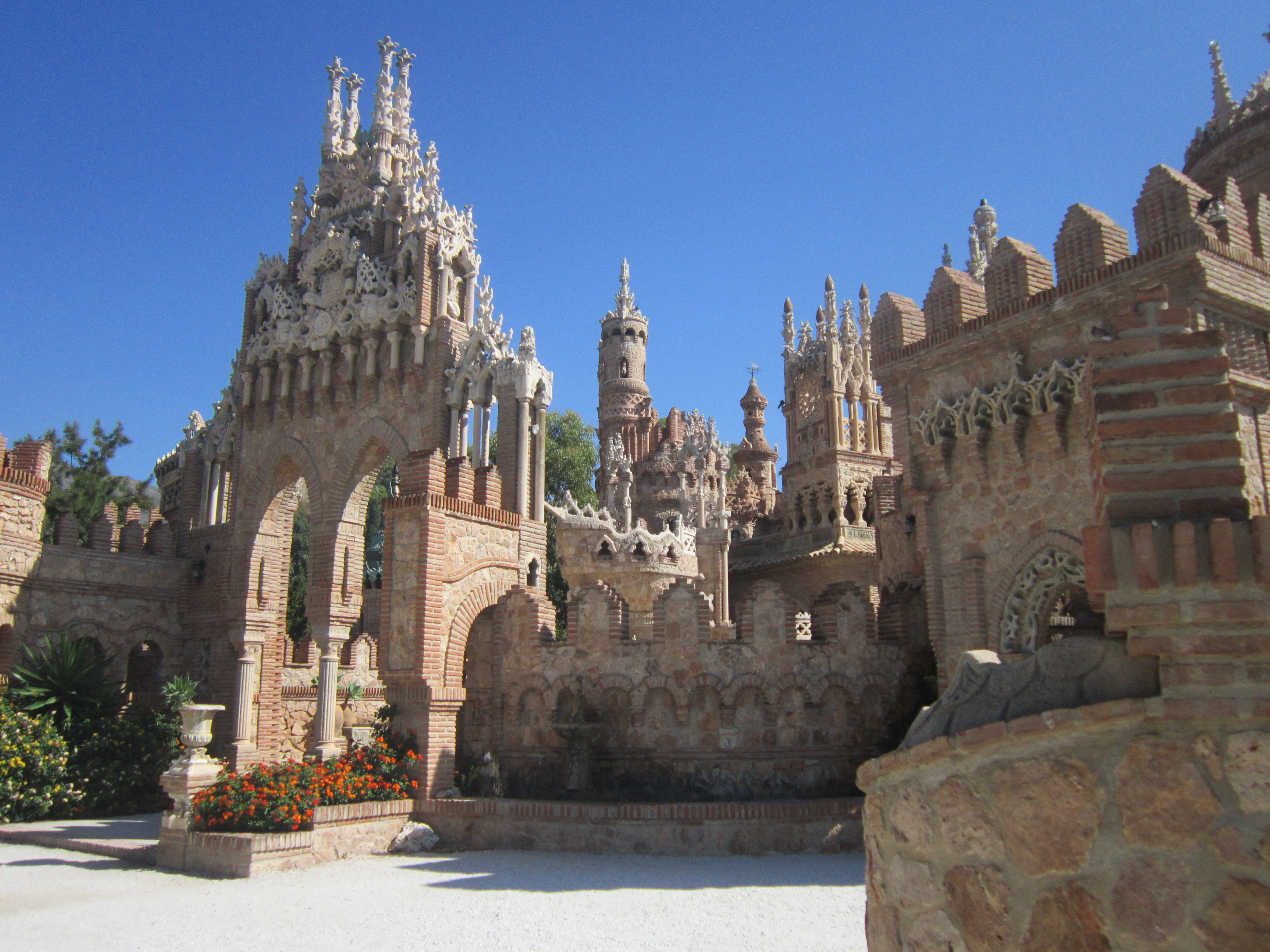 Chateau colomares BENALMADENA 1